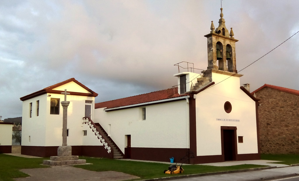 Igrexa de San Benito de Golmar, A Laracha, A Coruña.